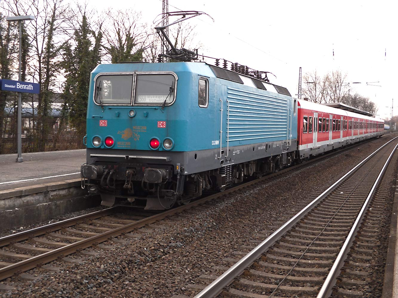 Station Benrath (Düsseldorf)